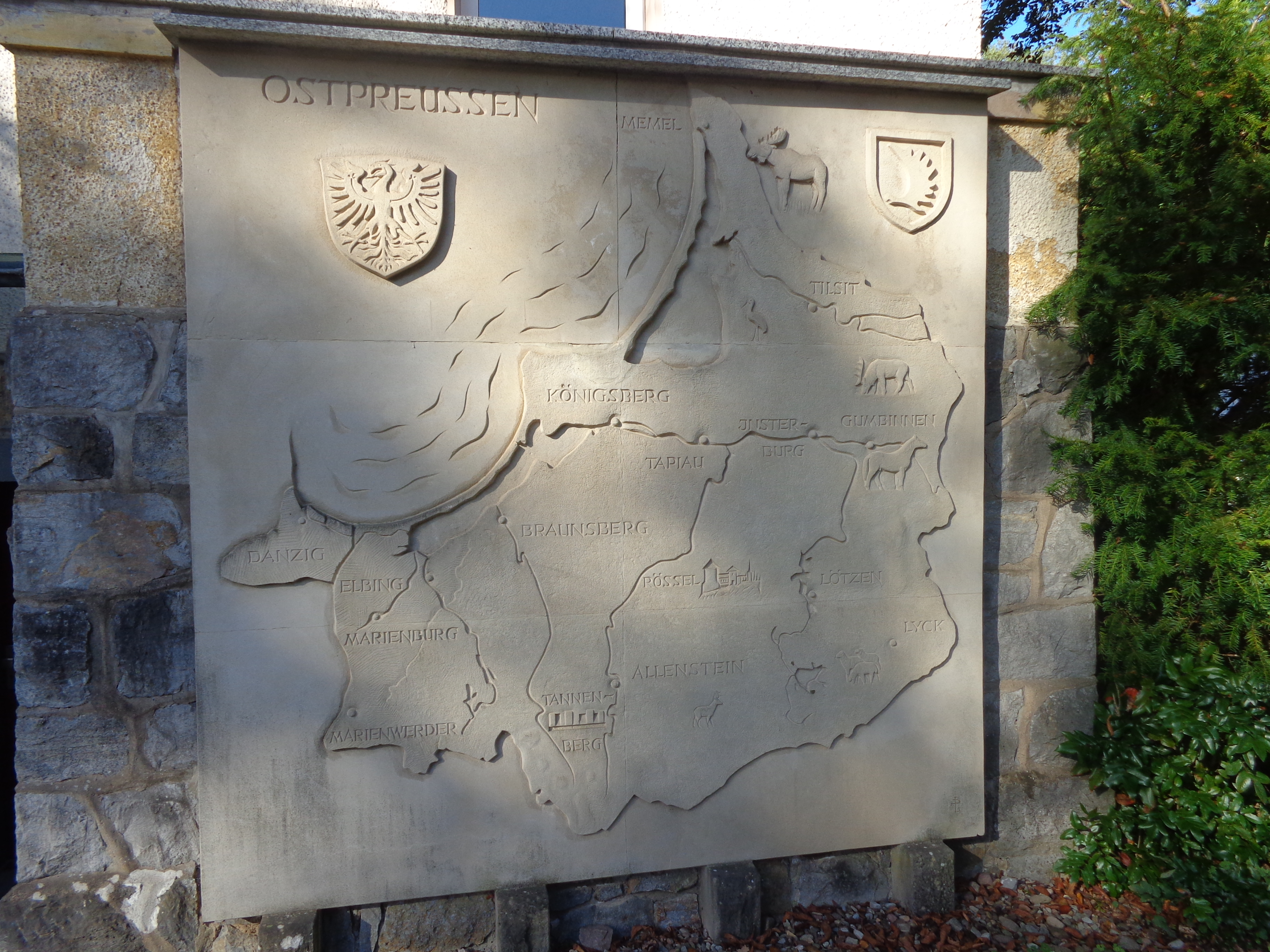 Wandrelief von Ostpreußen am Ostheim in Bad Pyrmont